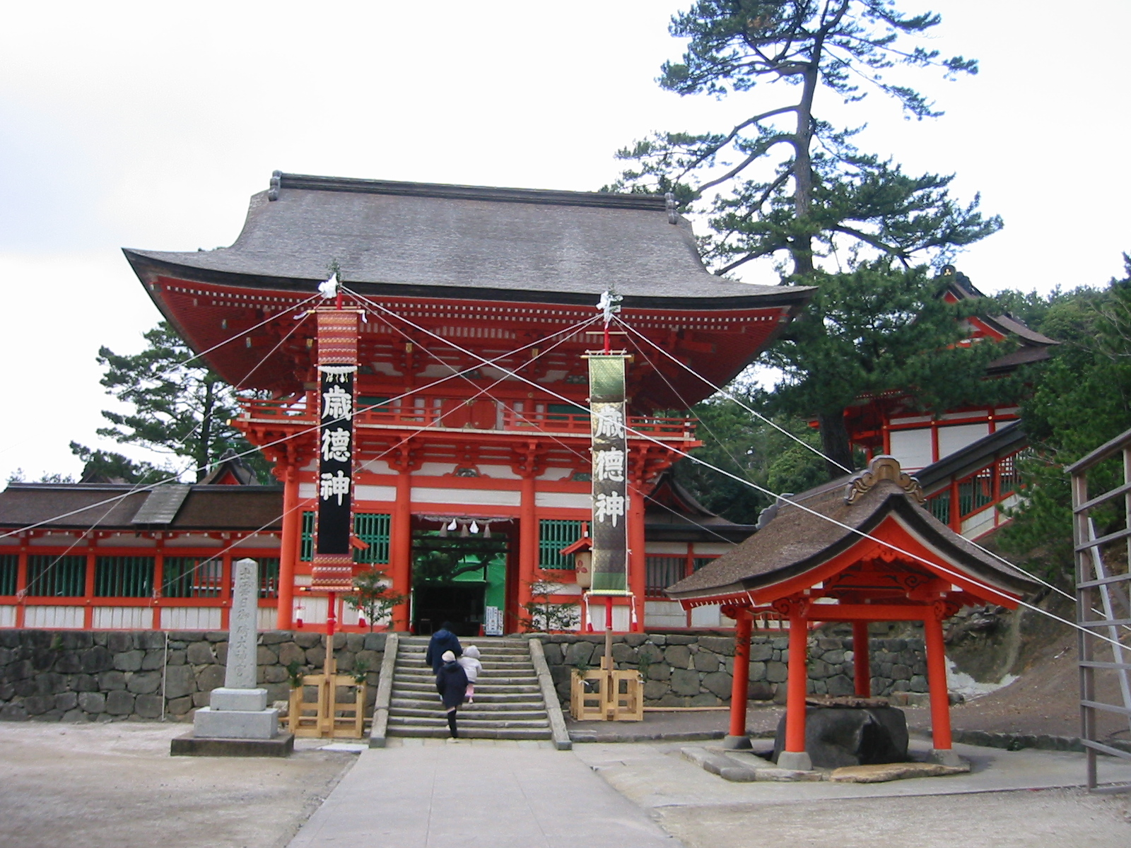 日御碕神社 楼門と歳徳神の大幟旗(のぼり) 二体の木造狛犬はこの中、